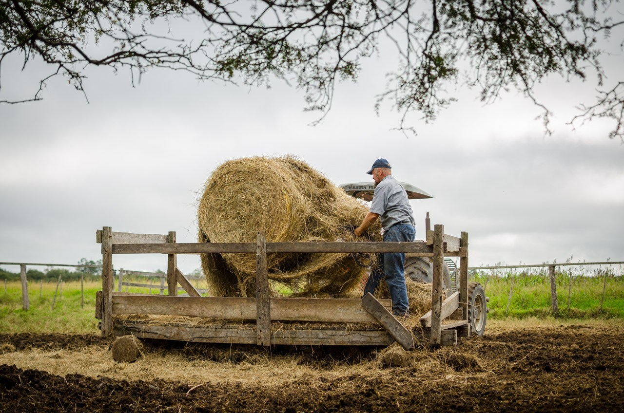 Joseph Giesbrecht desenrolla heno para alimentar a las vacas de su establecimiento ubicado a 6 kilómetros del centro de Lolita. Un rollo de heno puede alimentar a más de 100 vacas en un día en las épocas de sequía, como alternativa de alimento cuando las vacas no encuentran pastos verdes.